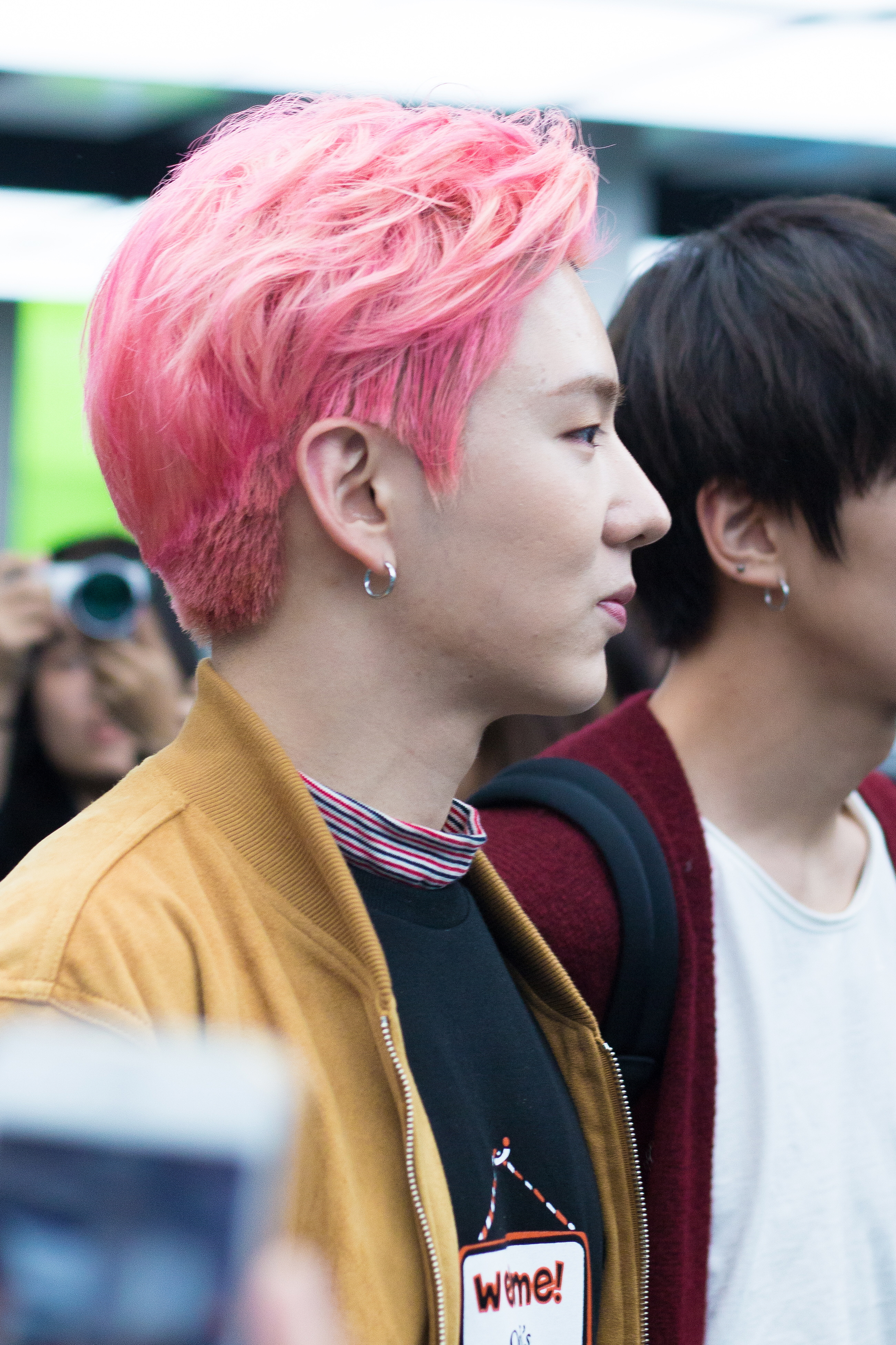 20161027 몬스타엑스 김포공항 입국